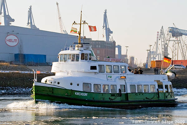 Das Traditionsschiff MS Kirchdorf fährt bei der HADAG die großen Hafenrundfahrten.